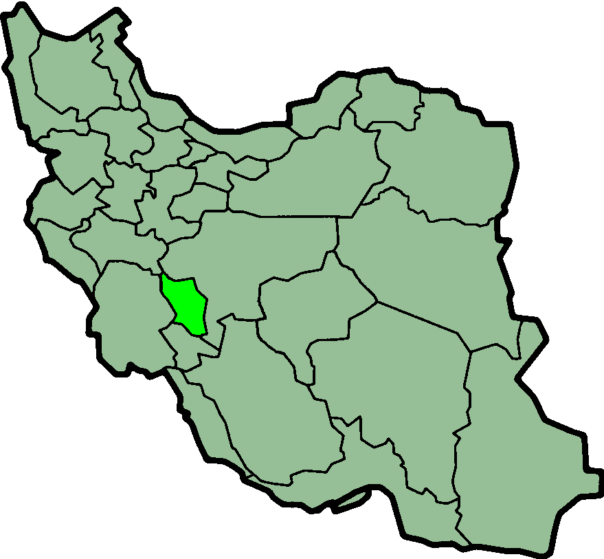 Province of Chahar Mahal and Bakhtiyari, Iran